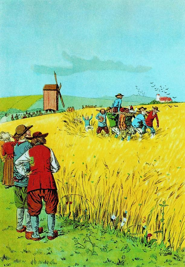 Alfred Schmidt viser med sin tegning fra 1887, hvordan molboerne undgår at lade hyrden træde kornet ned med sine store fødder, da storken skal jages væk.